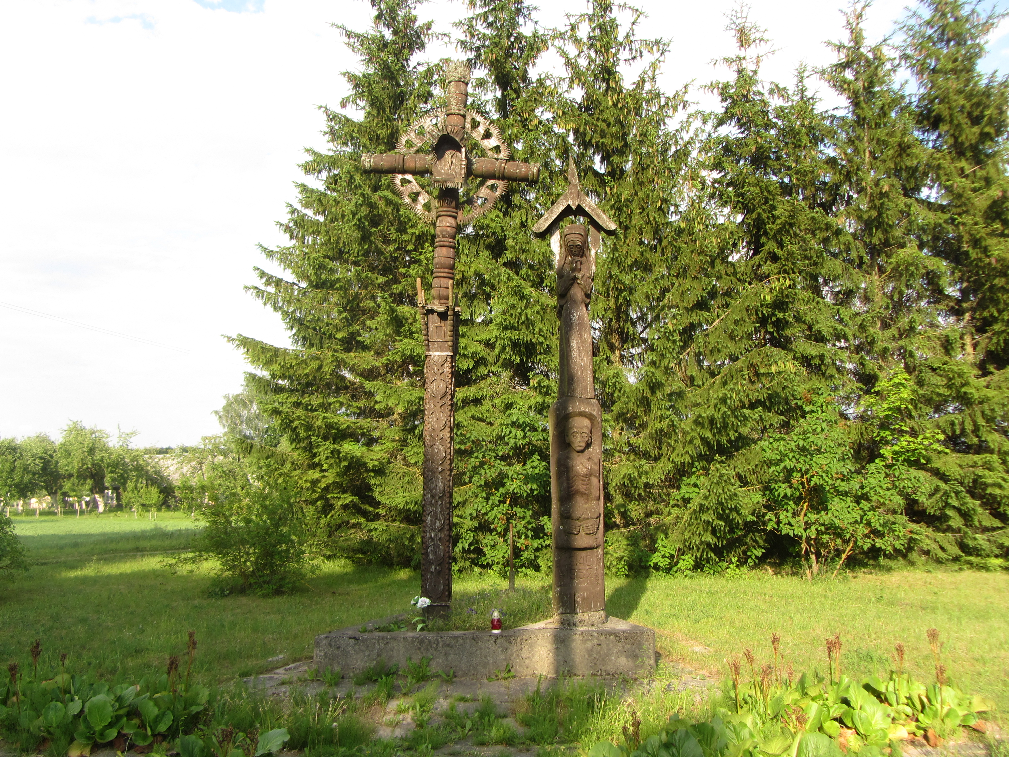 Skraičionys 62191, Lithuania